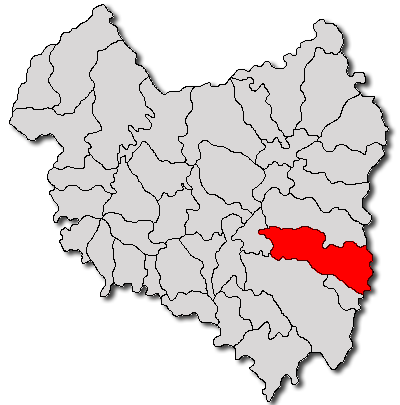 Categorie:Hărţi ale judeţului Covasna